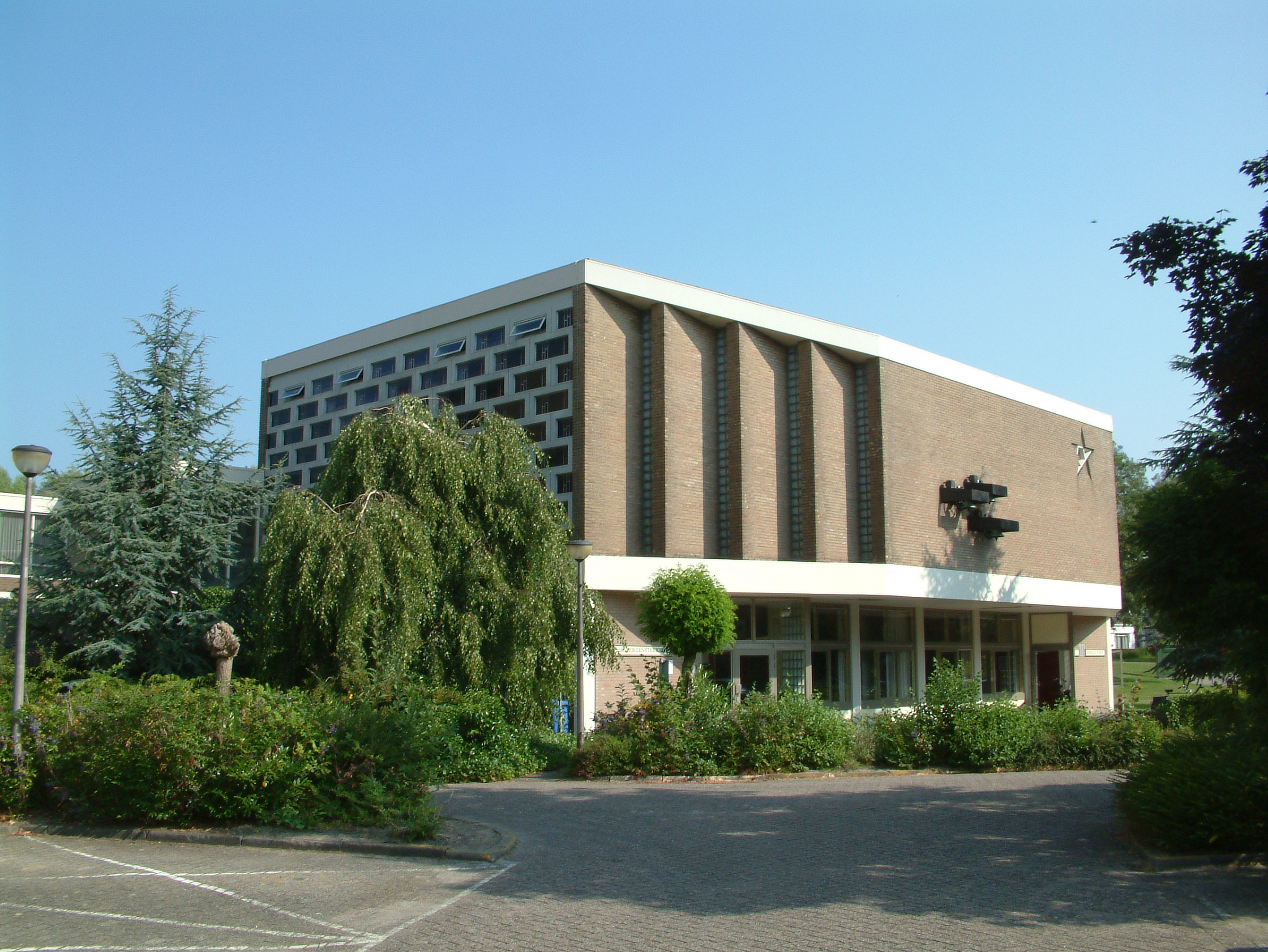 De Morgensterkerk in de wijk Dorp, Zoetermeer